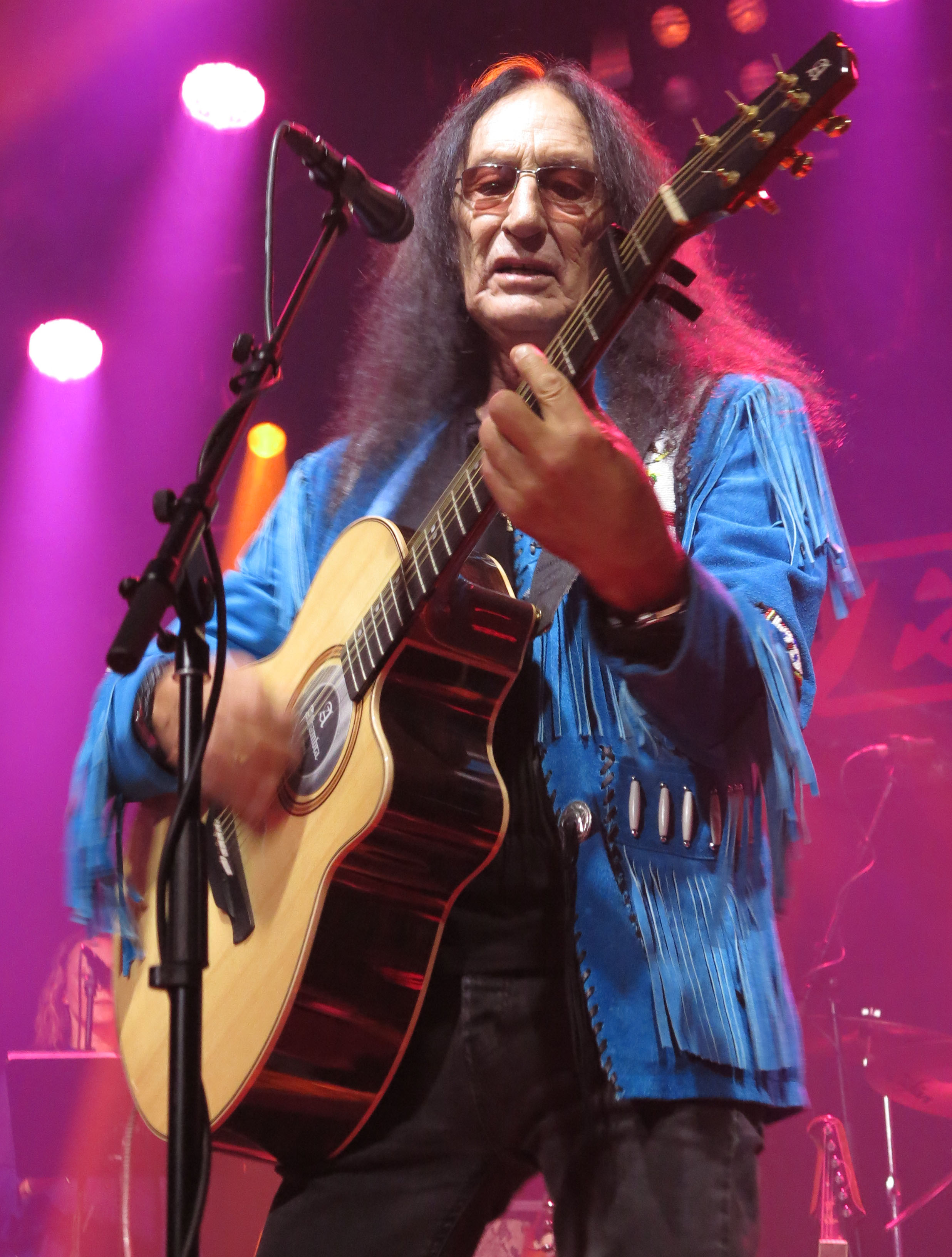 Ken Hensley Tavastia-klubilla vuonna 2019.